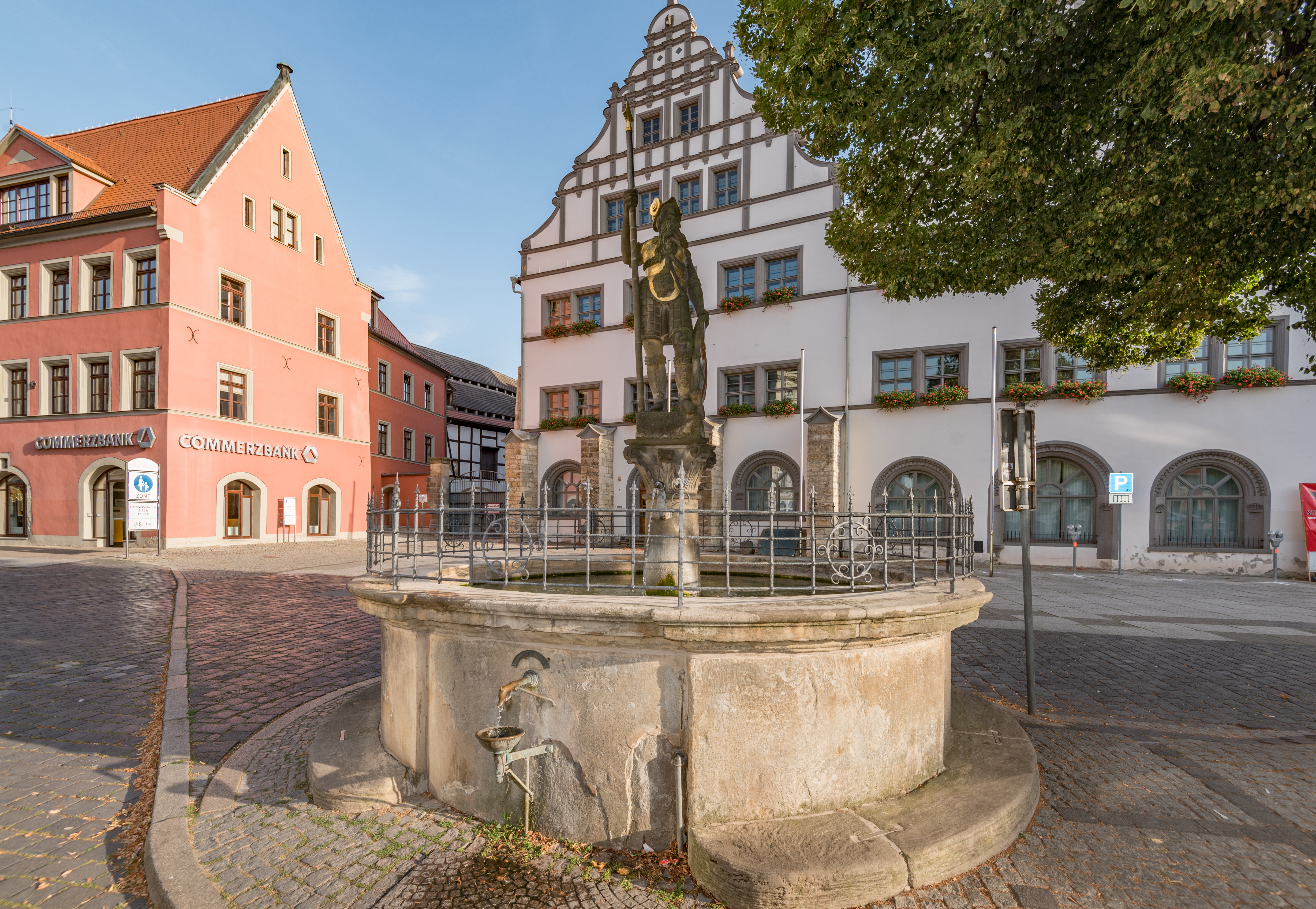 Naumburg (Saale), Markt, Wenzelsbrunnen